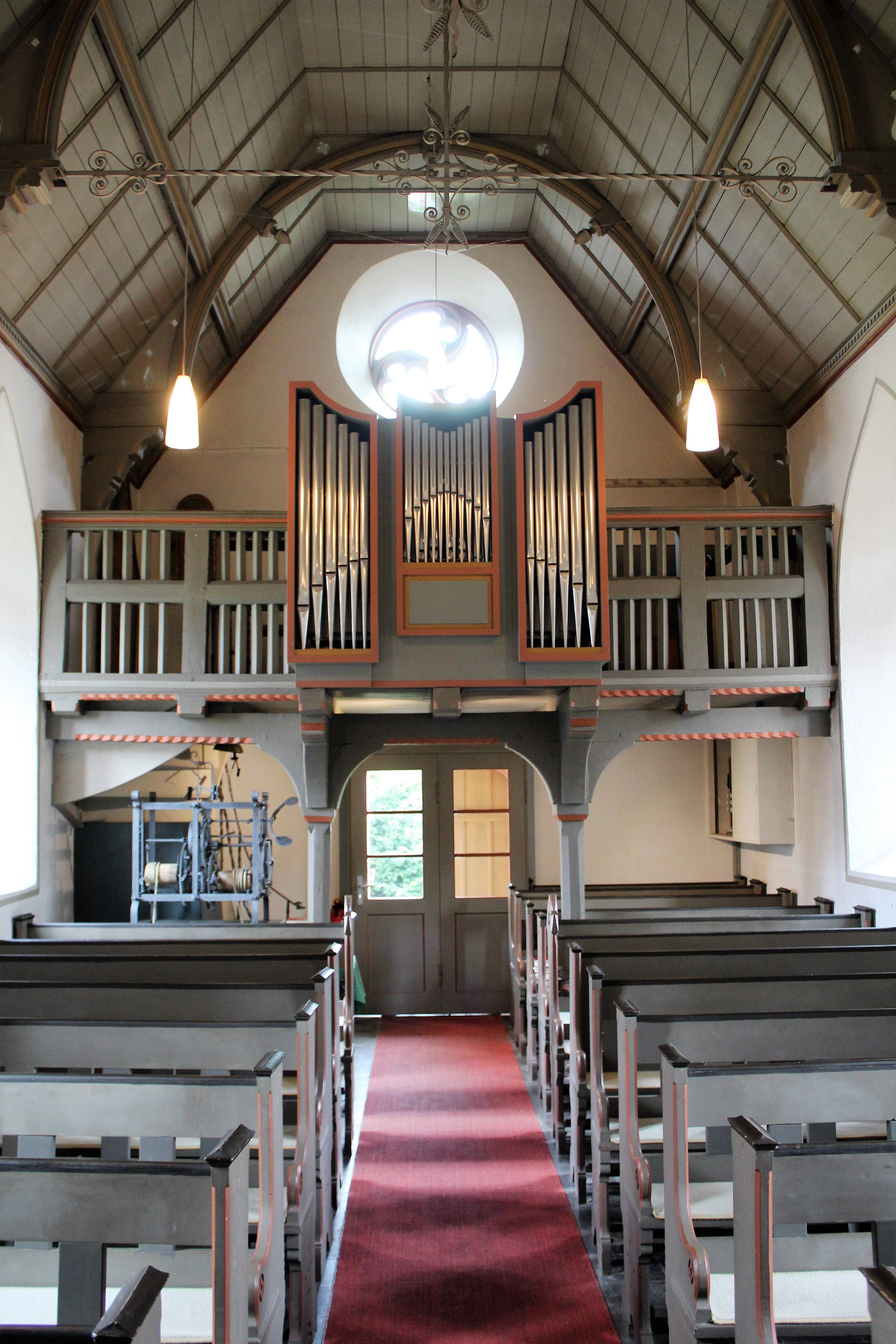 Evanglische Kirche Bortshausen, Landkreis Marburg-Biedenkopf, Hessen, Deutschland